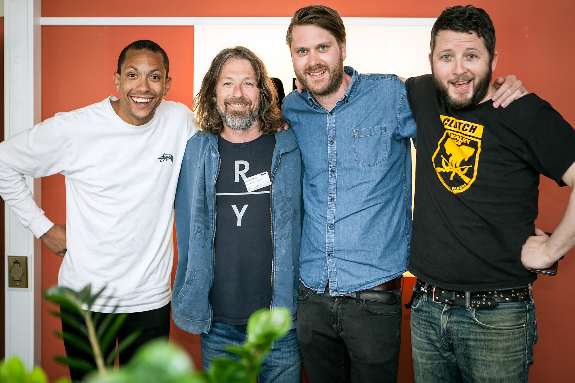 Heia Fotball med Myggen som gjest 16. mai 2017. Fv: Tete Lidbom, Erik Mykland, Sven Bisgaard Sundet og Lars Haugdal Andersen. Foto: Christer Pettersen-Dahl / NRK